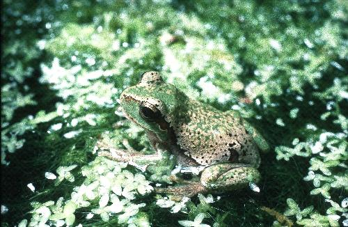 Hyla arborea am Laichplatz. Bemerkenswert die gerade wechselnde Färbung der Hautoberfläche.